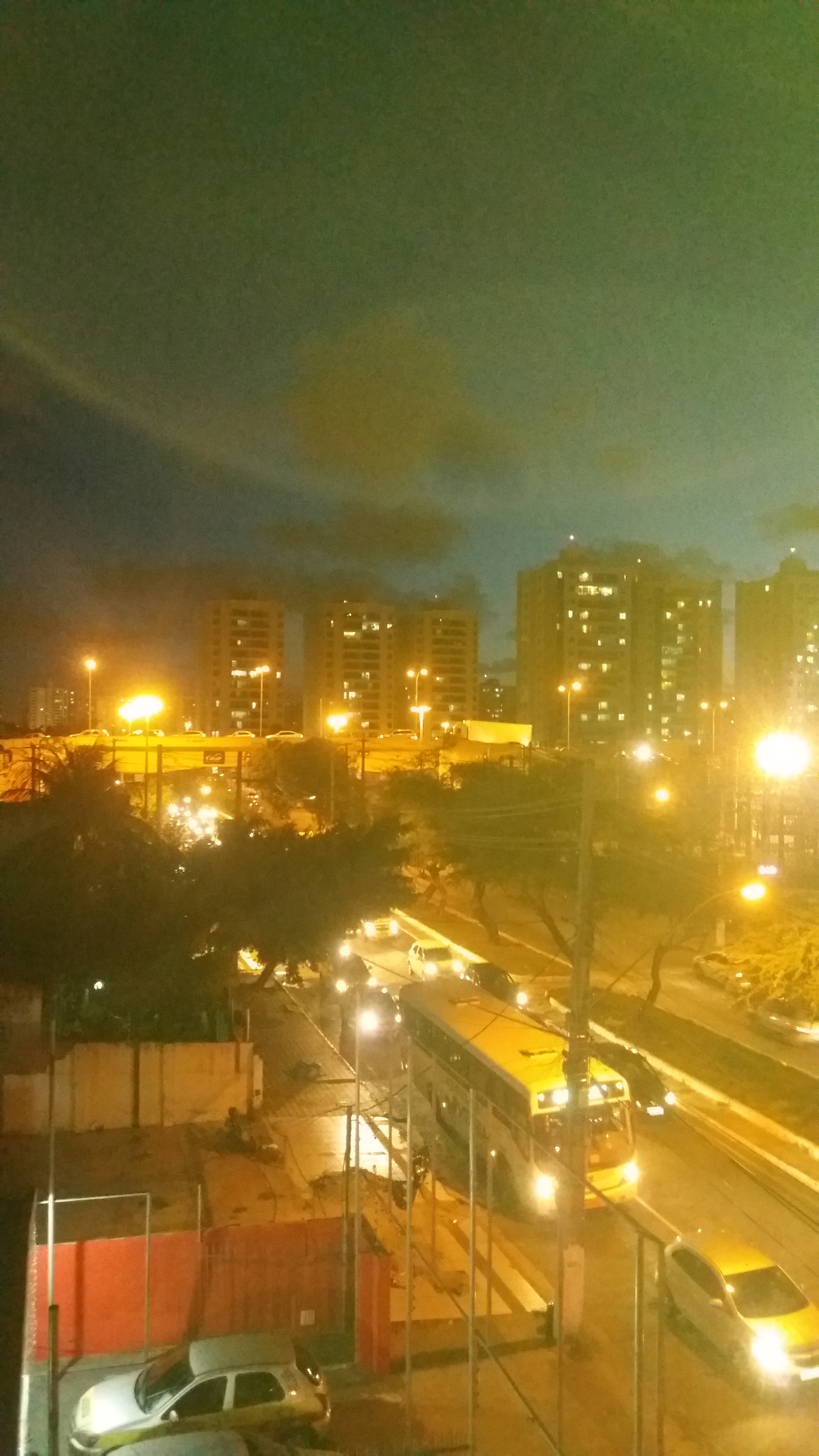 Avenida Hermes Fontes, Aracaju, Sergipe, Brasil, 2017